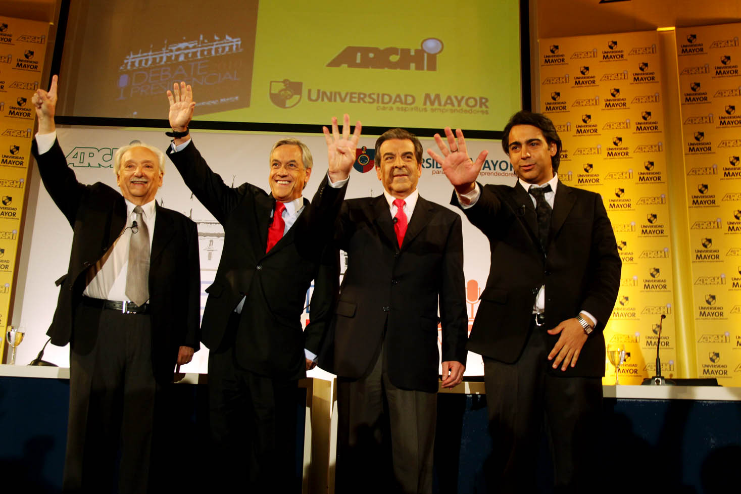 Candidatos presidenciales en el debate presidencial radial ARCHI-Universidad Mayor. De izquierda a derecha: Jorge Arrate, Sebastian Piñera, Eduardo Frei Ruiz-Tagle, Marco Enriquez-Ominami.